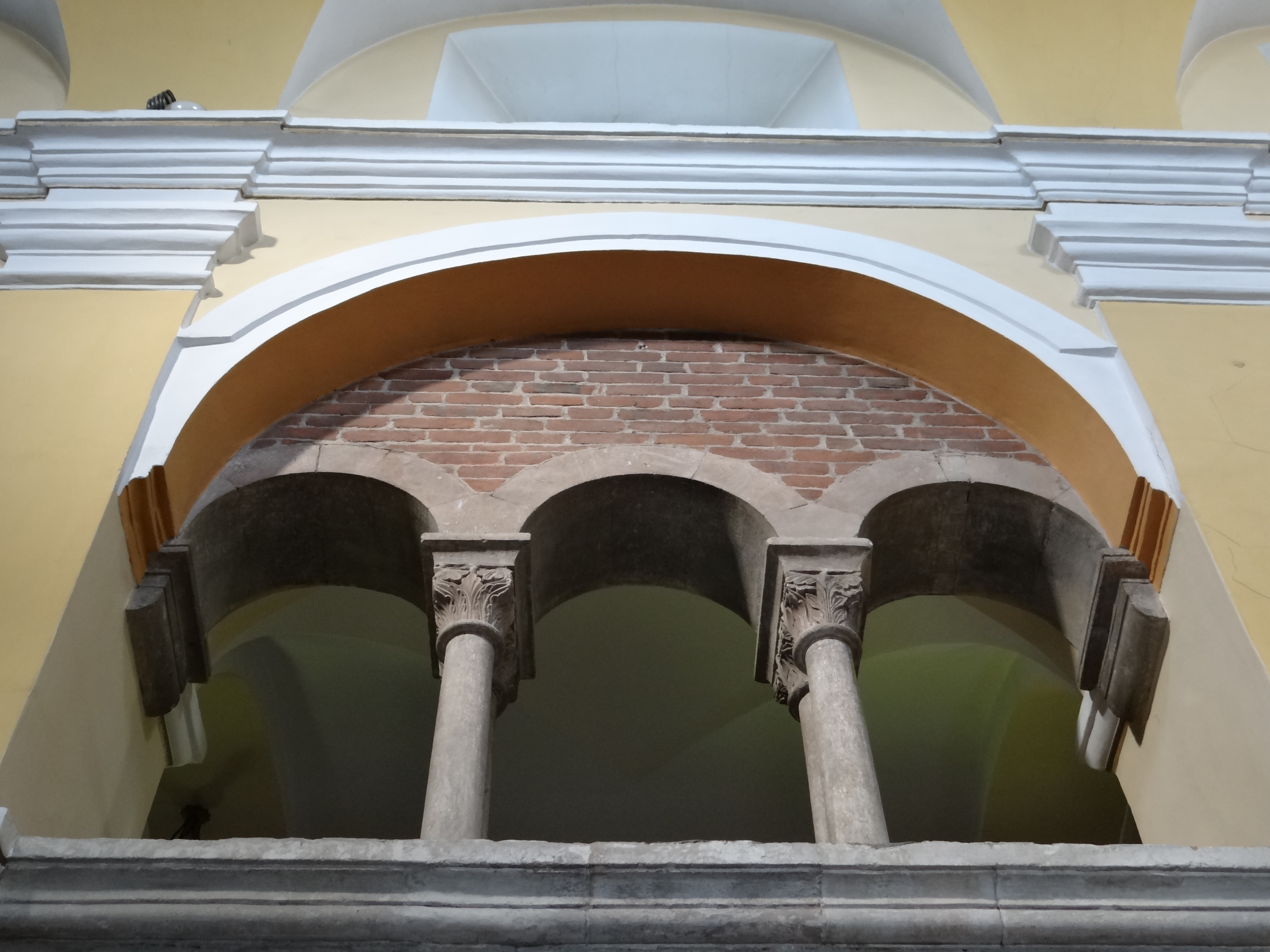 Kościelec - rzymskokatolicki kościół parafialny p.w. św. Wojciecha, 1230, 1628-1634, 1865, XX (wnętrze)